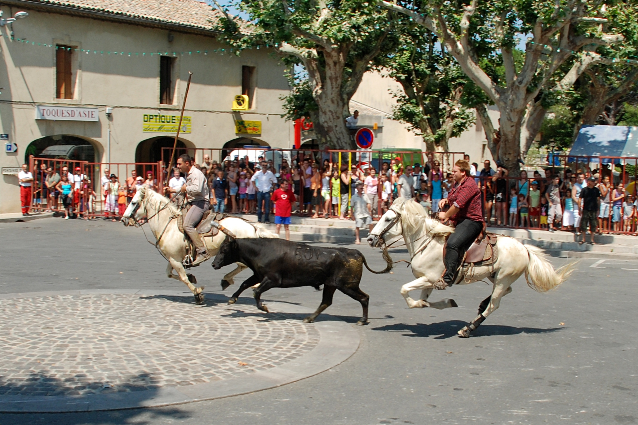 France - Gard - Calvisson - Bandido